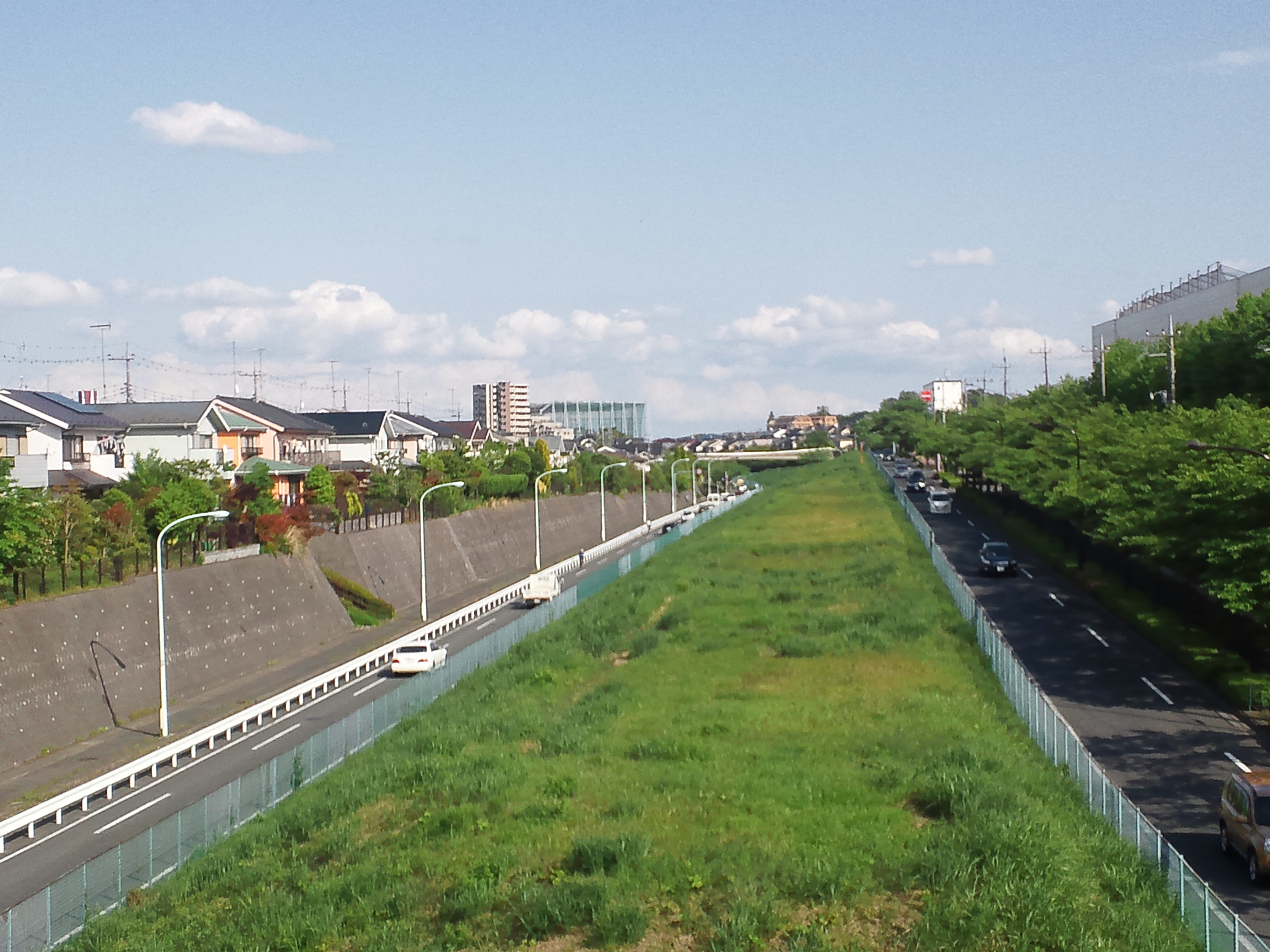 Y字橋（多摩市鶴牧5丁目）より稲城方向